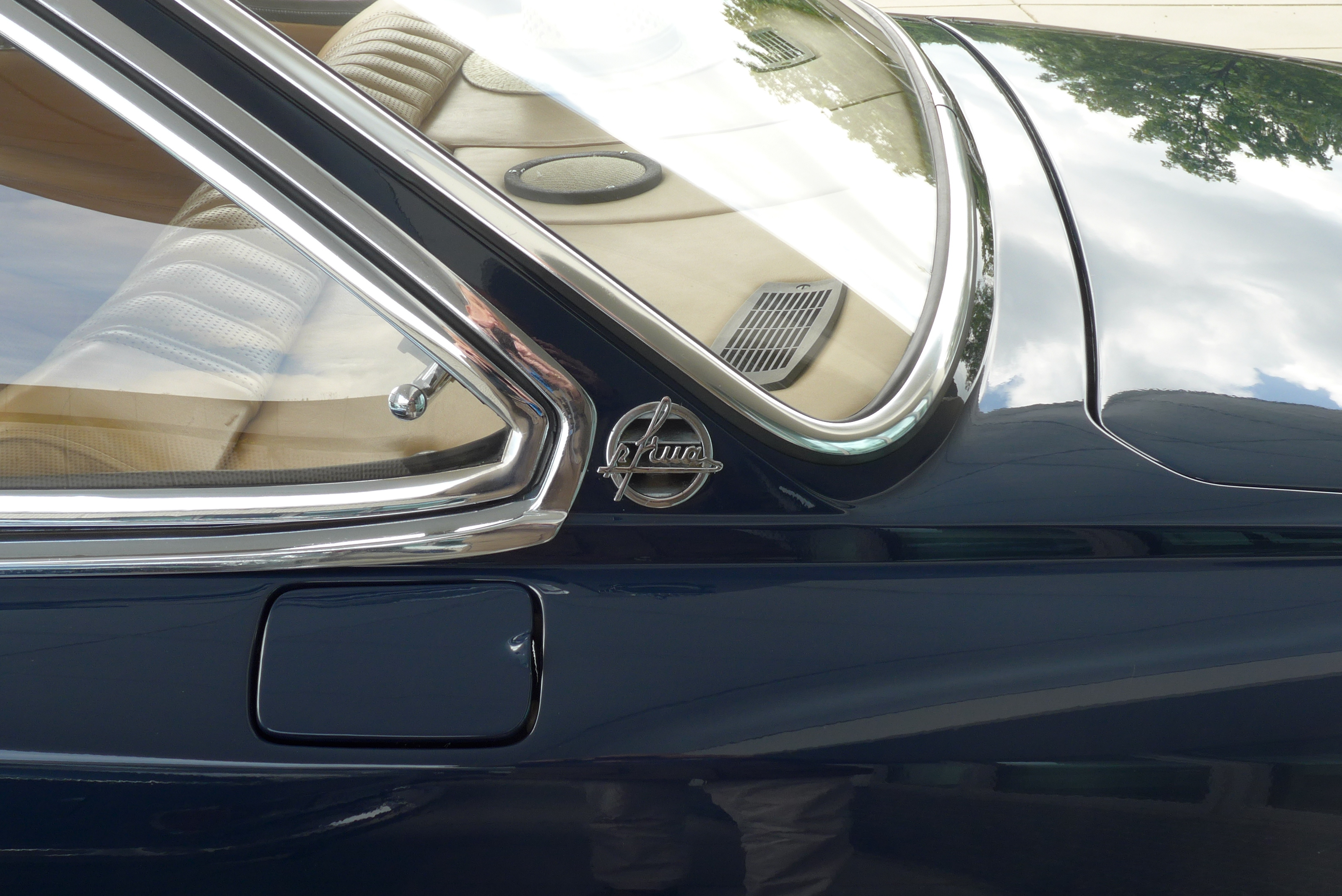 Glas V8-1966 vor BMW Museum, 2018-06-24